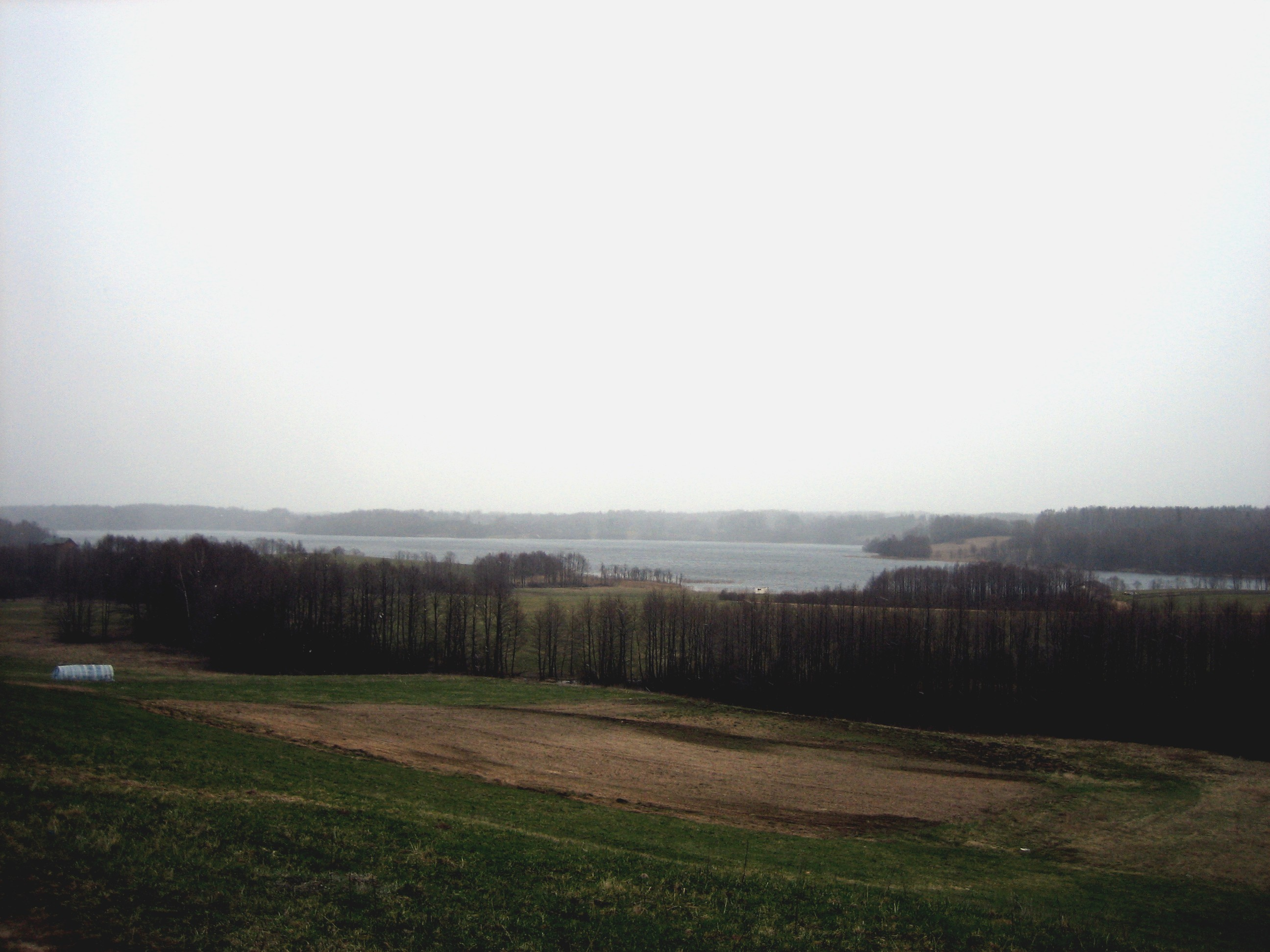 Virintų ežeras